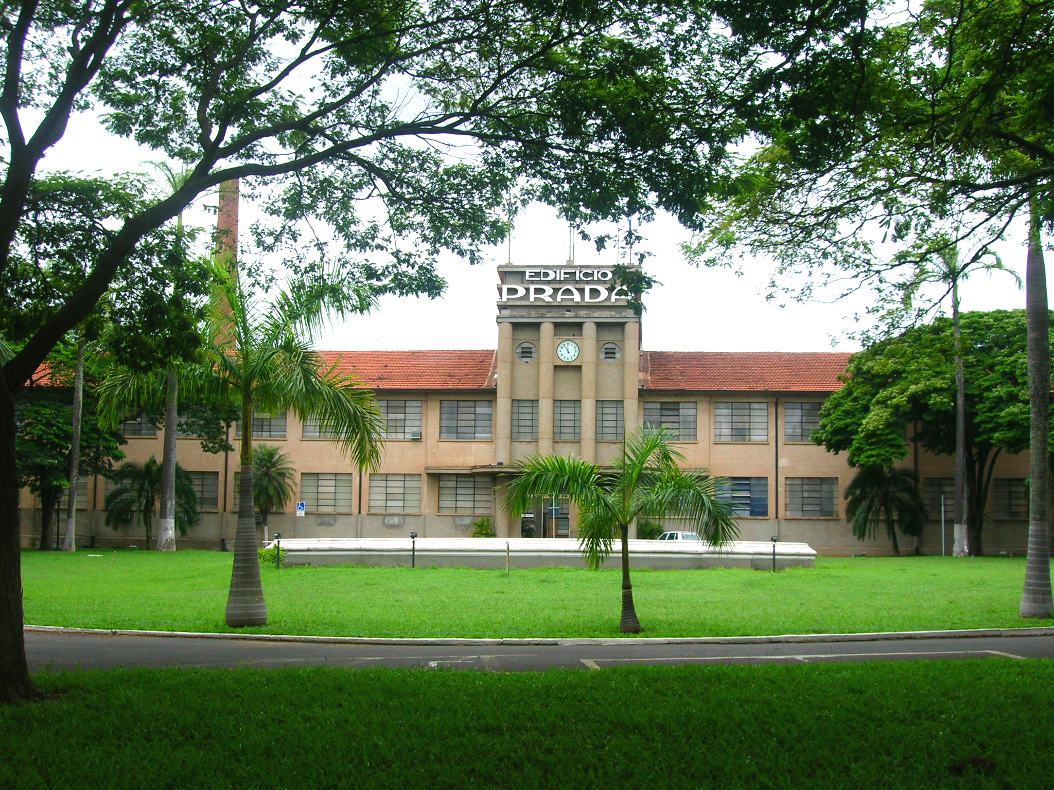 Antiga Indústria de Chapéus Prada, construída em 1937, atual sede da Prefeitura Municipal de Limeira - SP